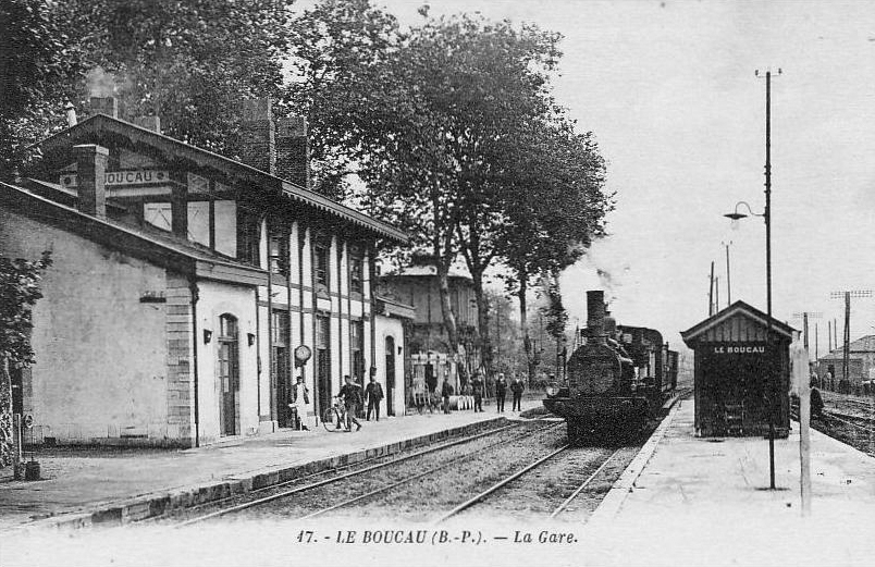 La gare vers 1900 avec le bâtiment de cette époque et une desserte par un train à traction vapeur.